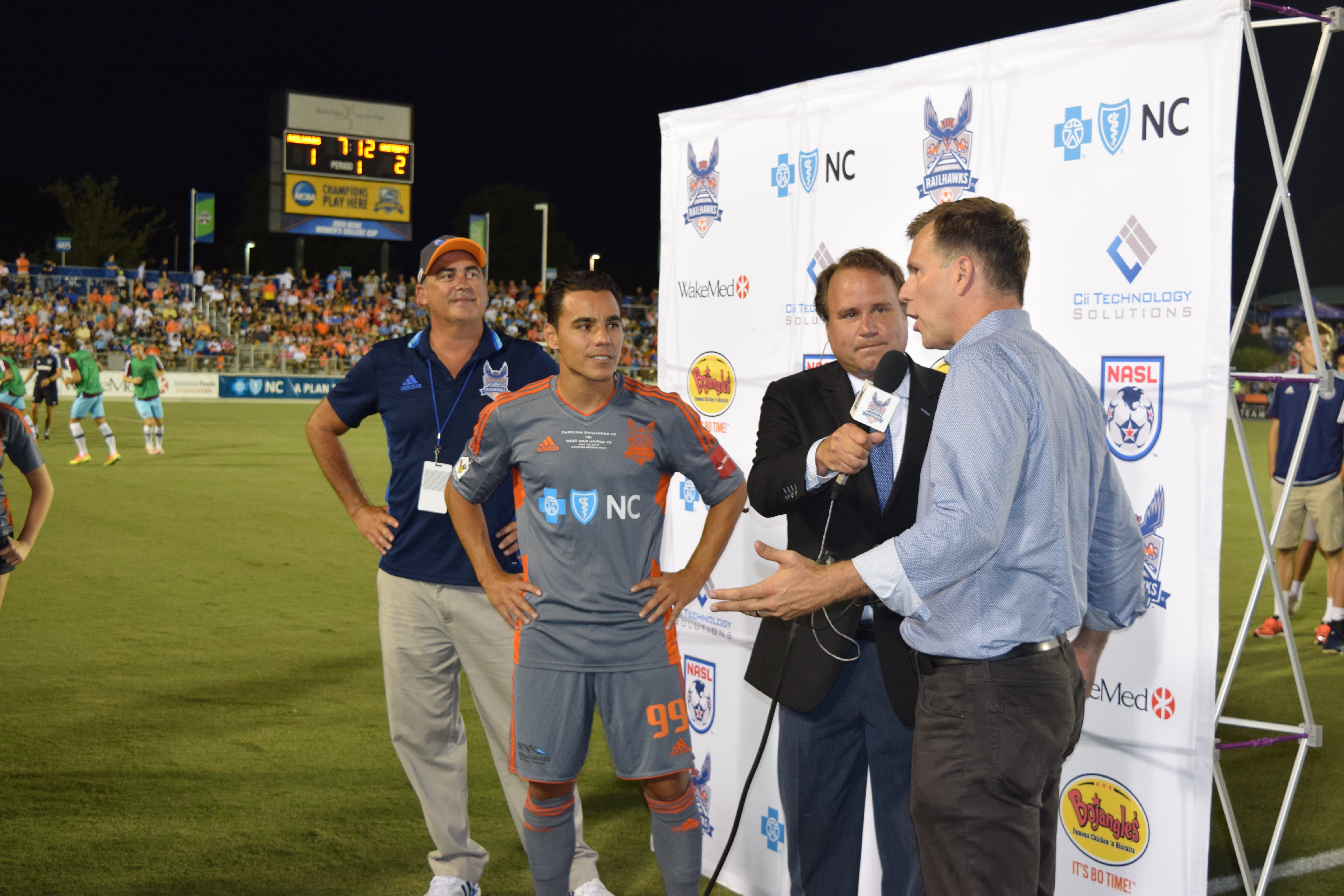 El martes 12 de julio al medio tiempo del partido amistoso en contra de WestHam United, el presidente Curt Johnson y el dueño Stephen Malik anunciaron a Omar Bravo como refuerzo y primer jugador mexicano en la historia del equipo.